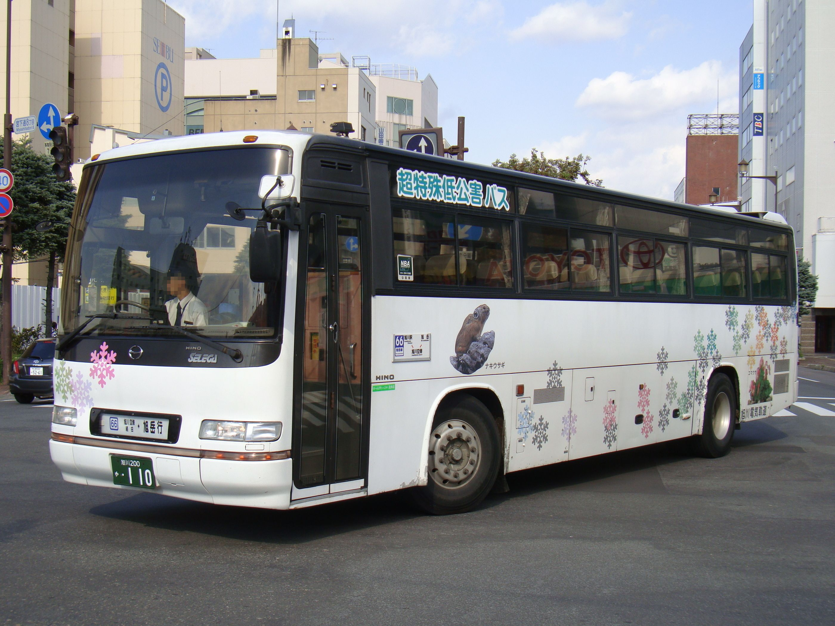 Asahikawa Station to Asahidake Onsen